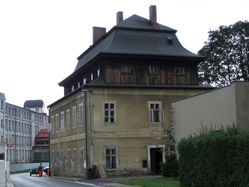 Koželužna, Tyršova 68, Sladovnická 68, Poříčí (Broumov).